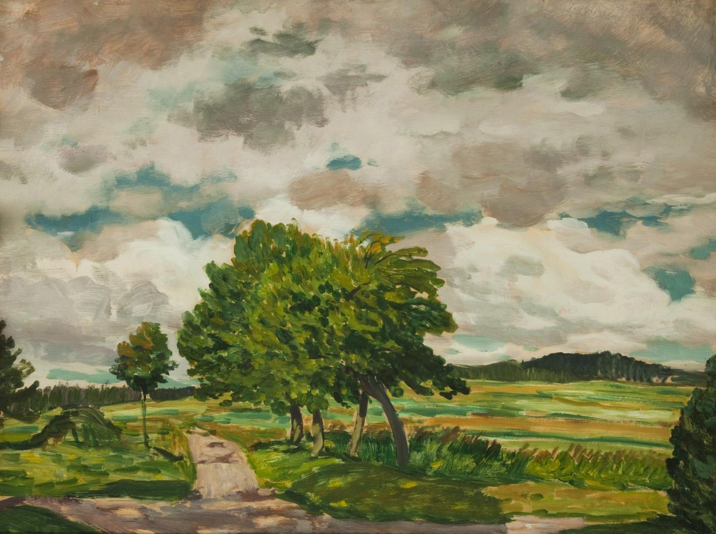 Bäume am Weg, rechts unten mit Bleistift signiert: Ant. Hudeček, Öl/Karton, 48 x 64 cm